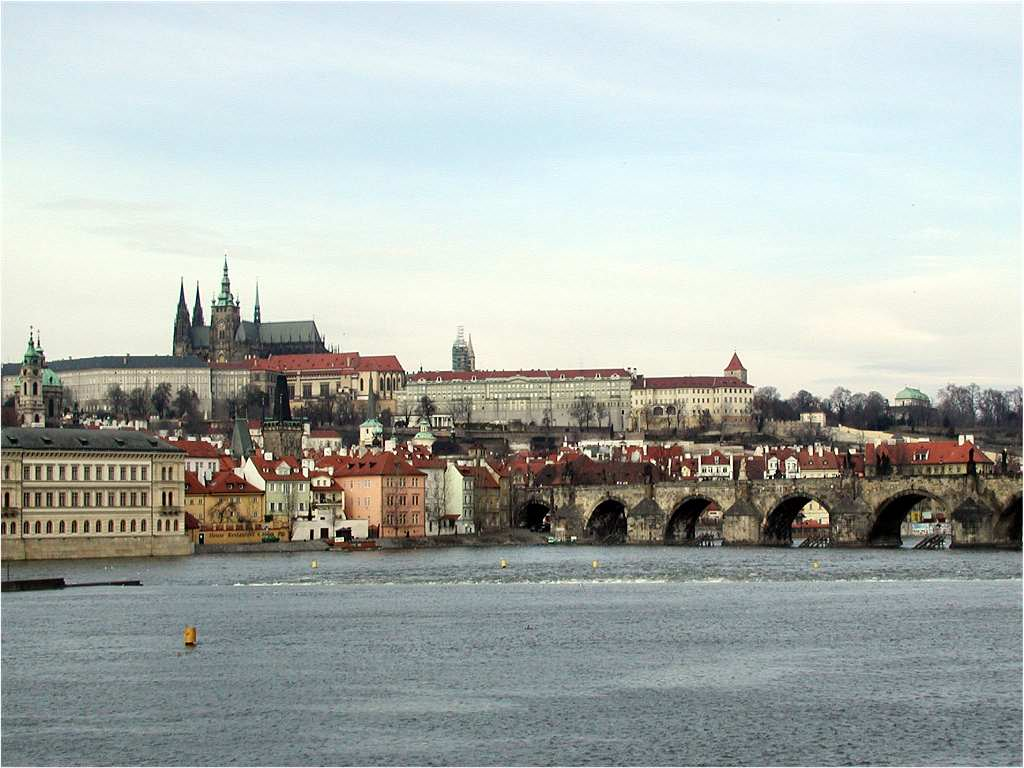 La Vltava à Prague Photo de Jean-Luc Bailleul ( prise en février 2002.